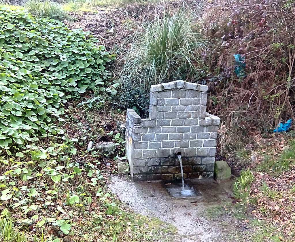 Fonteiroa, Ferrol.